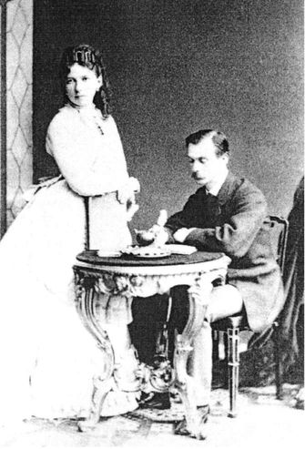 Николай Иванович Новосильцев (1849-1816) и его жена Елизавета Новосильцева, ур. Оболенская (1853-1926)